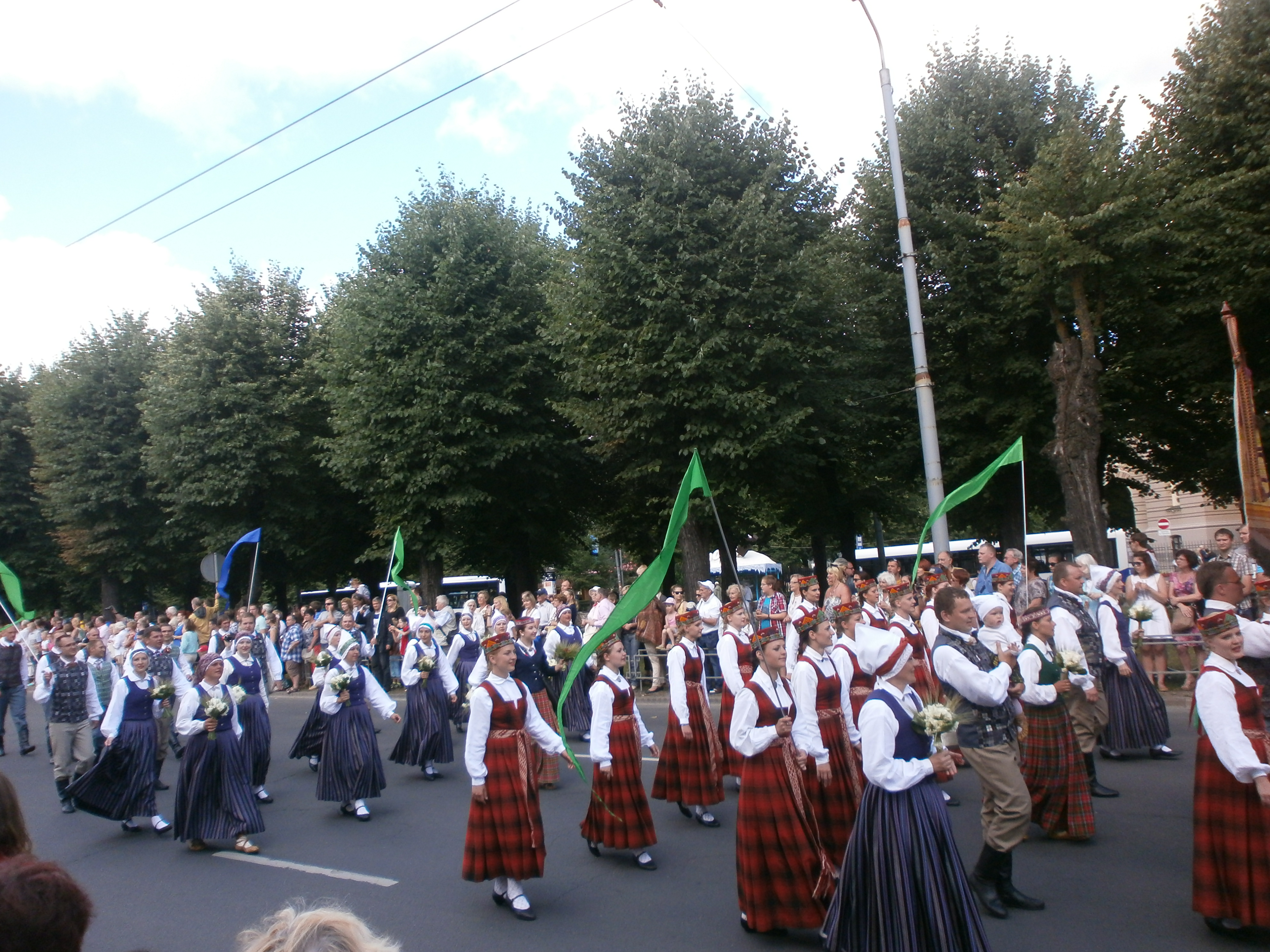 Dziesmu un deju svētku gājiens 2013. gadā